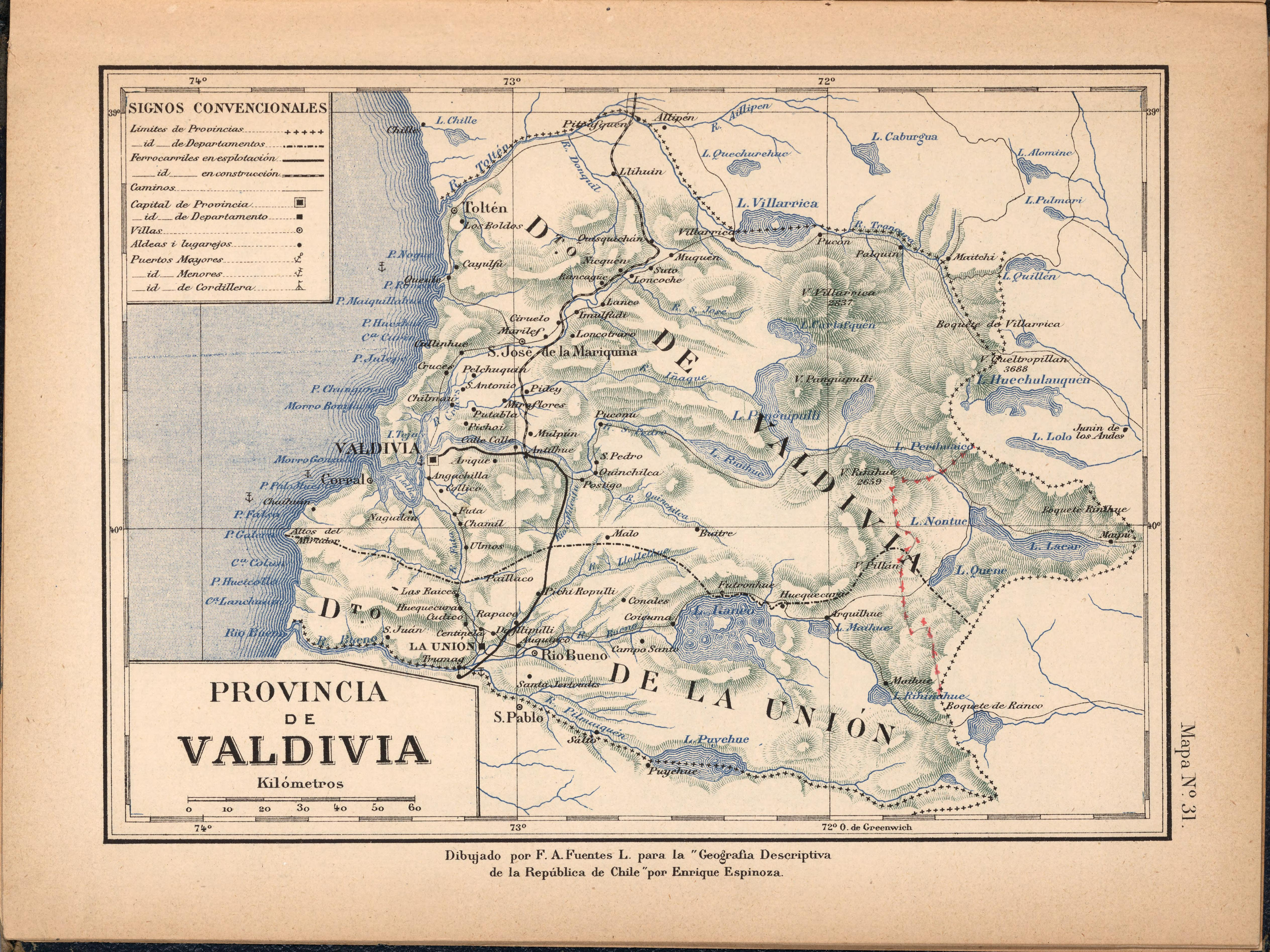 Atlas de Chile Arreglado para la Jeografia Descriptiva de la Republica de Chile por Enrique Espinoza.